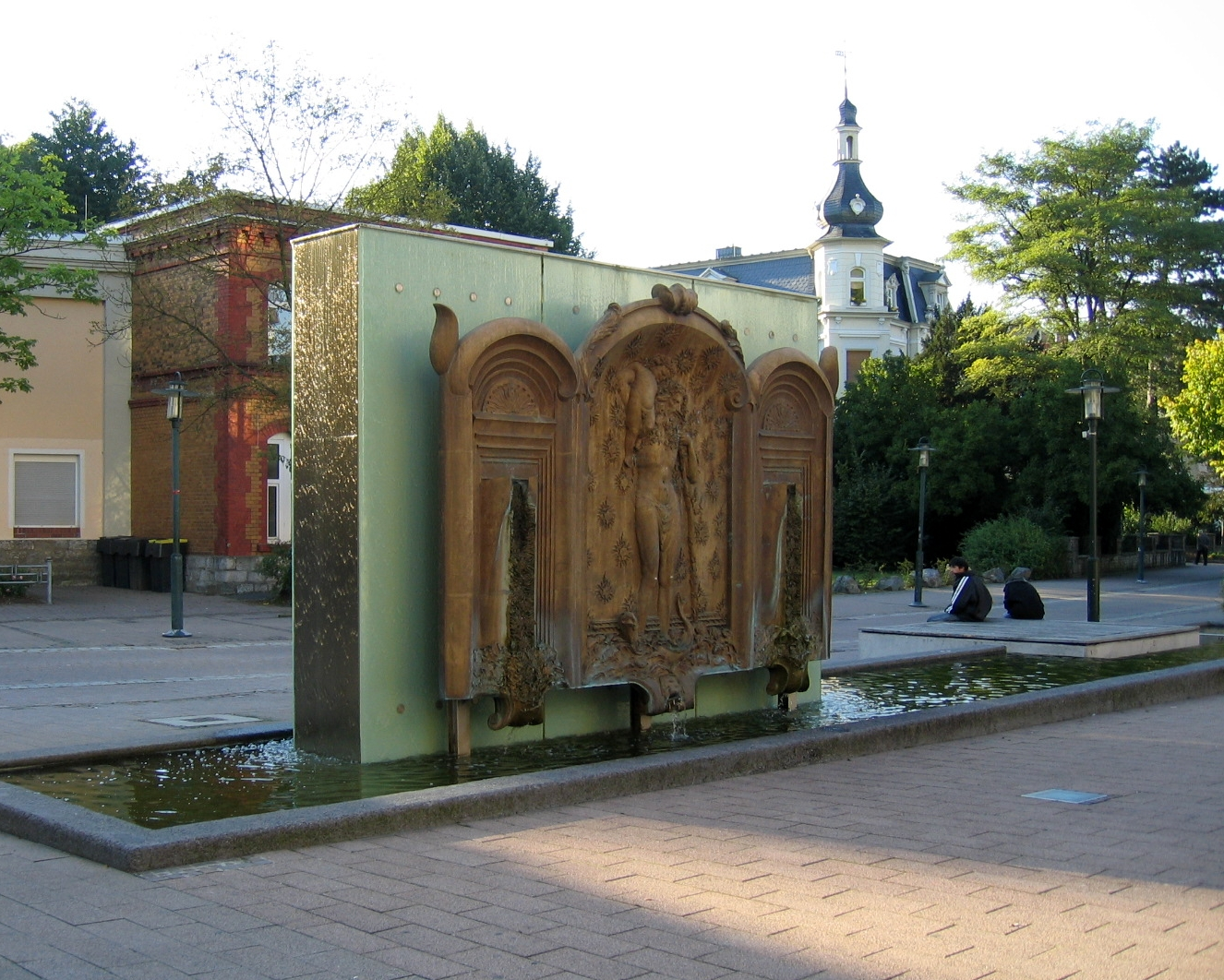 Christophorus-Brunnen, Architektur aus Stein und Stahl, Brunnen-Relief von Prof. Fuchs. Abgebildet hierauf, der Riese Christopherus, der das nicht mit Insignien und Glorie versehene Christus-Kind durch die Fluten trägt. Sie überwinden beide die Flut, die sich rechts und links in dem Triptychon Bahn bricht. Der Brunnen war ein Geschenk von Friedrich Grohe an die Stadt Hemer (Germany) im Jahr 1977.